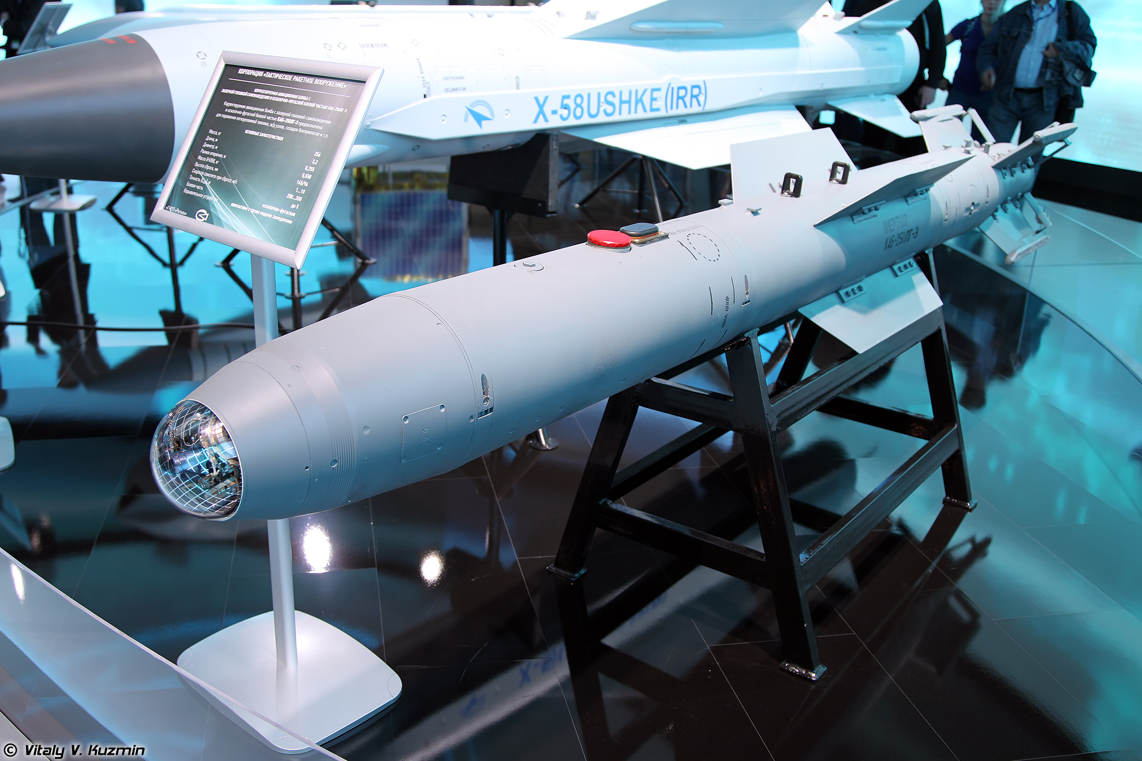 Авиабомба КАБ-250ЛГ-Э